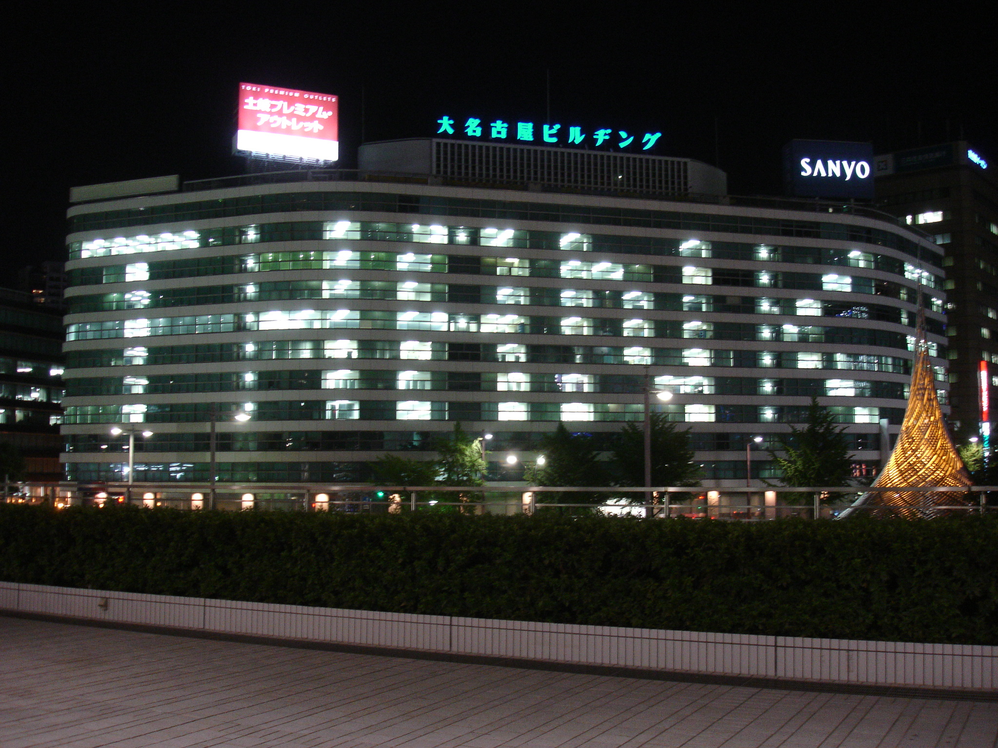 「大名古屋ビルヂング」から感謝のメッセージ－窓に「THANKS」の文字